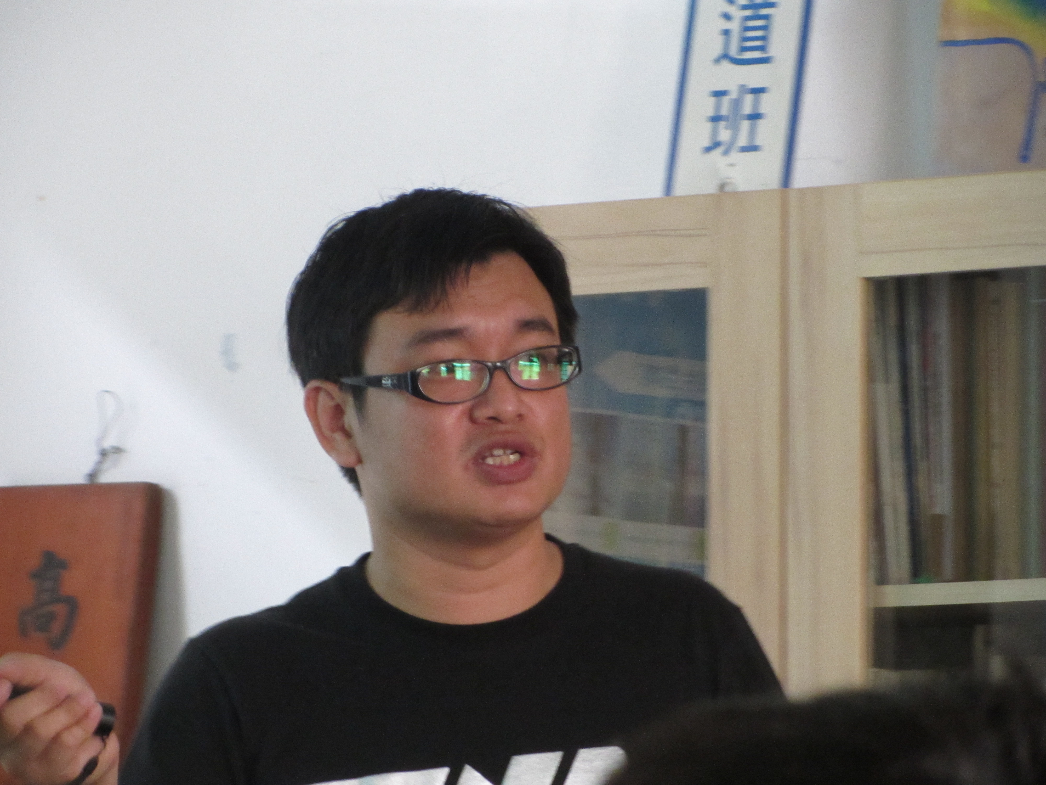 在打狗鐵道故事館演講的台灣鐵道研究者，中華民國海軍軍官鄧志忠，2013年。